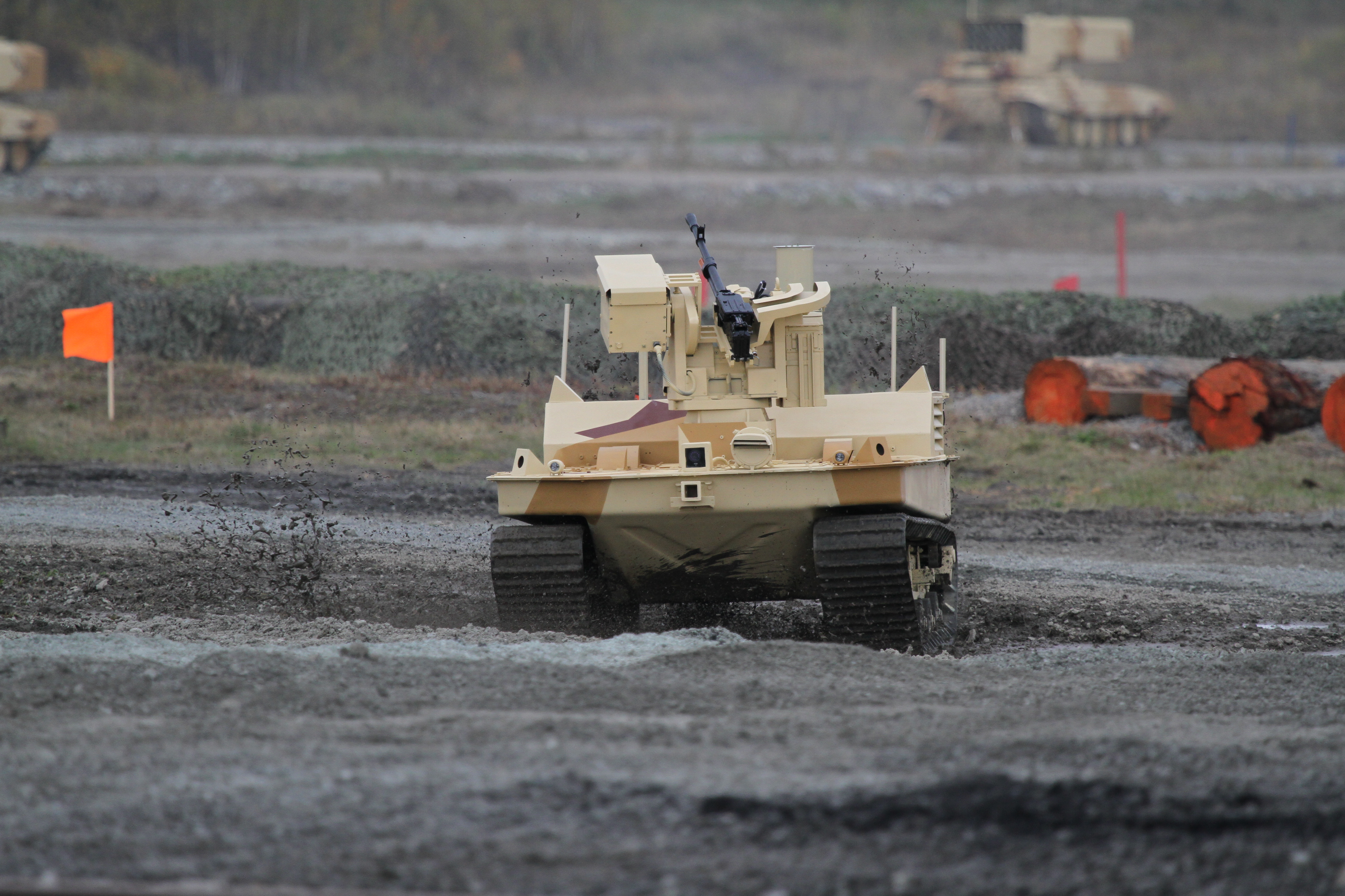 Роботизированный комплекс МРК (MRK combat robot system)